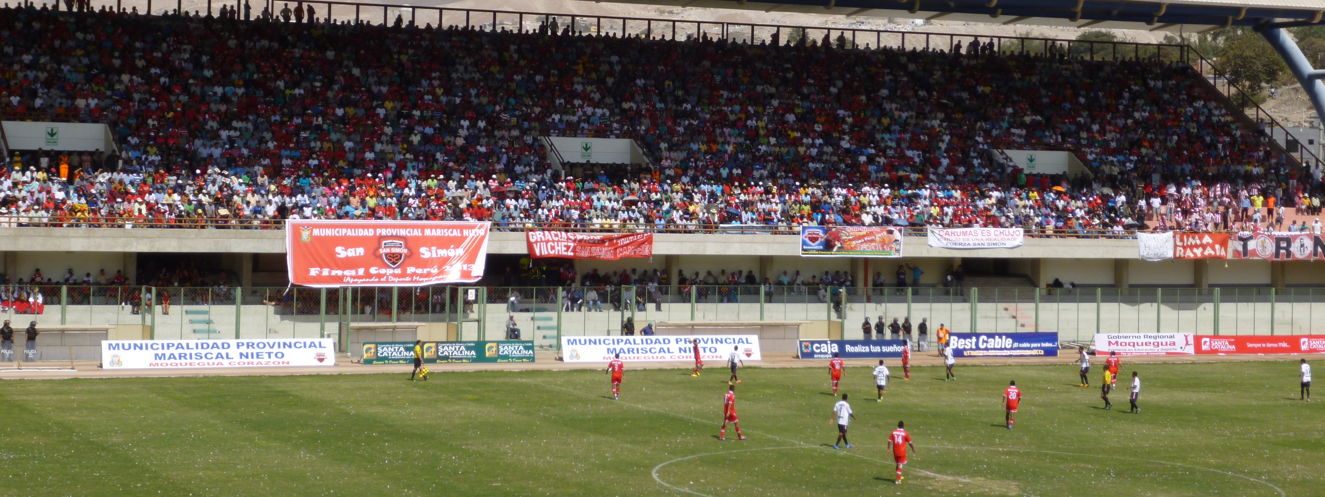 Panoramica del Estadio 25 de Noviembre en Moquegua